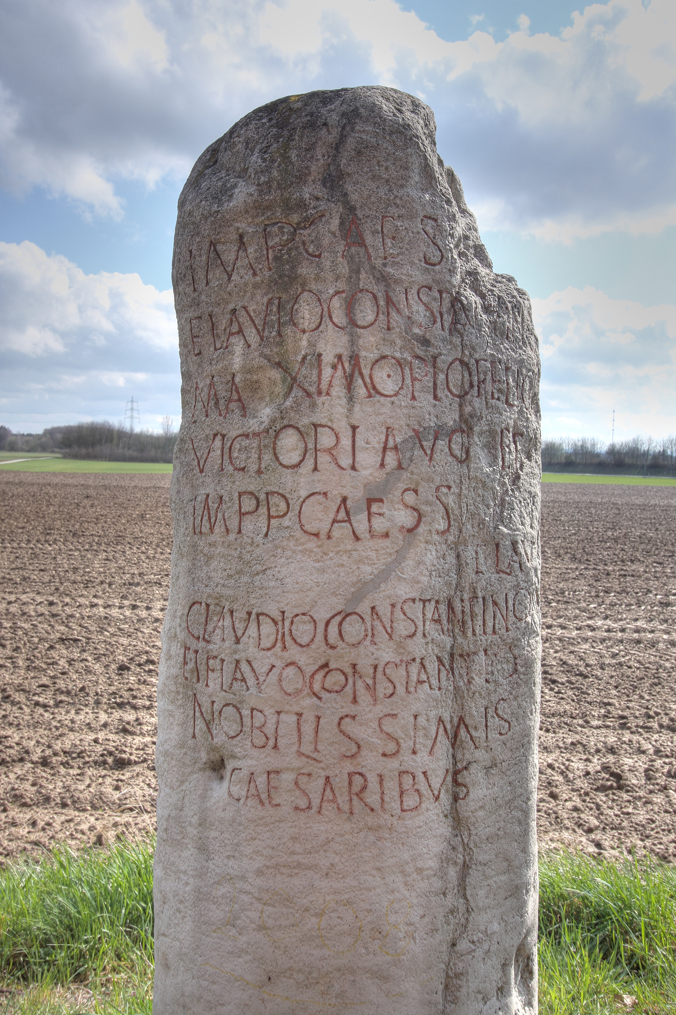 Kopie eines römischen Meilensteins mit einer Inschrift für den Kaiser Konstantin und seine Söhne aus dem Jahr 325/326. Auf dem Stein wird eine Entfernung von XVI Leugae (35,5 km) nach Köln angegeben. Fundort: Zülpich-Hoven. Original (Kalkstein) im Rheinischen Landesmuseum. Schillinger, 216